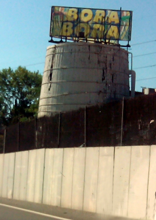 Tina del celler de la Societat de Barberà, actualment a Esparreguera.